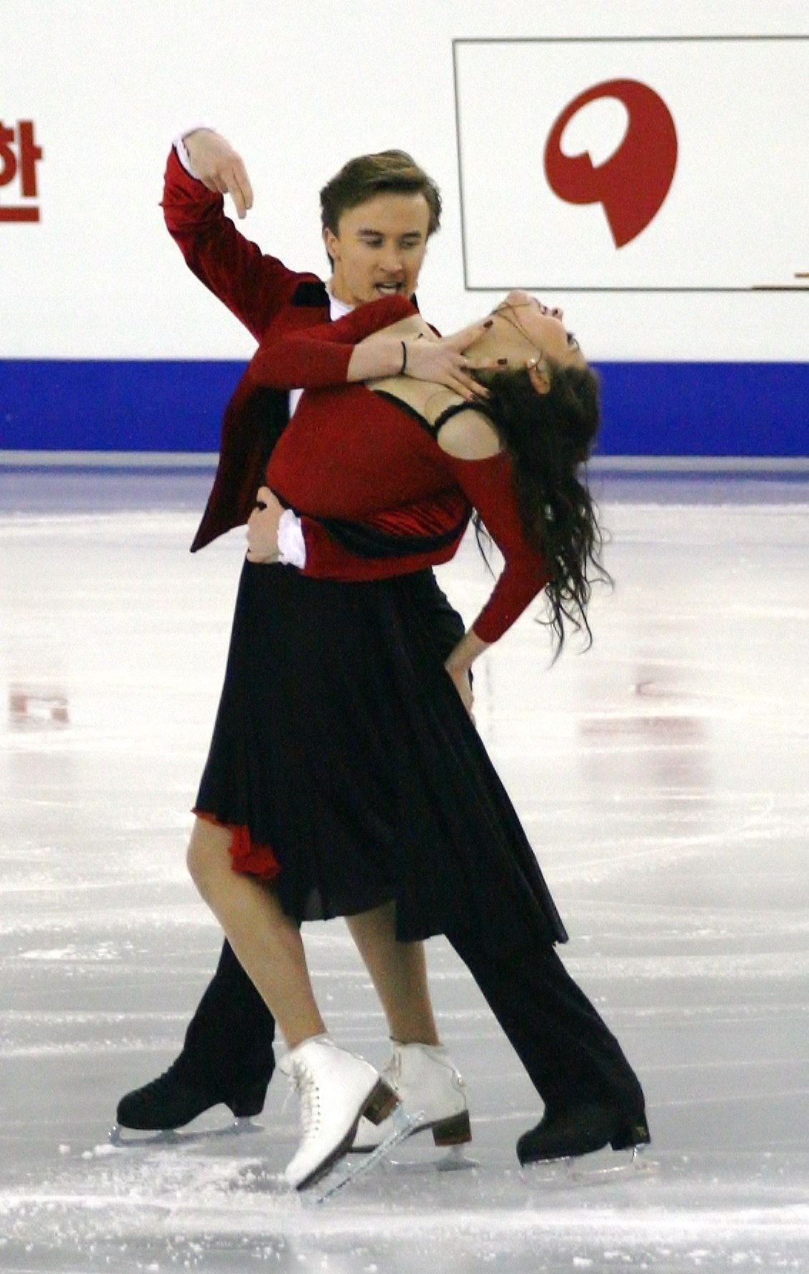 Елена Ильиных и Руслан Жиганшин (Россия) на финале Гран-при по фигурному катанию 2014-2015.